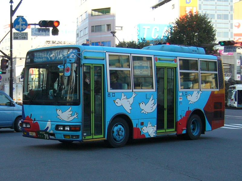 登録番号 長野200か・・70 川中島バス所属 ぐるりん号用 2006年3月25日 長野駅前にて撮影